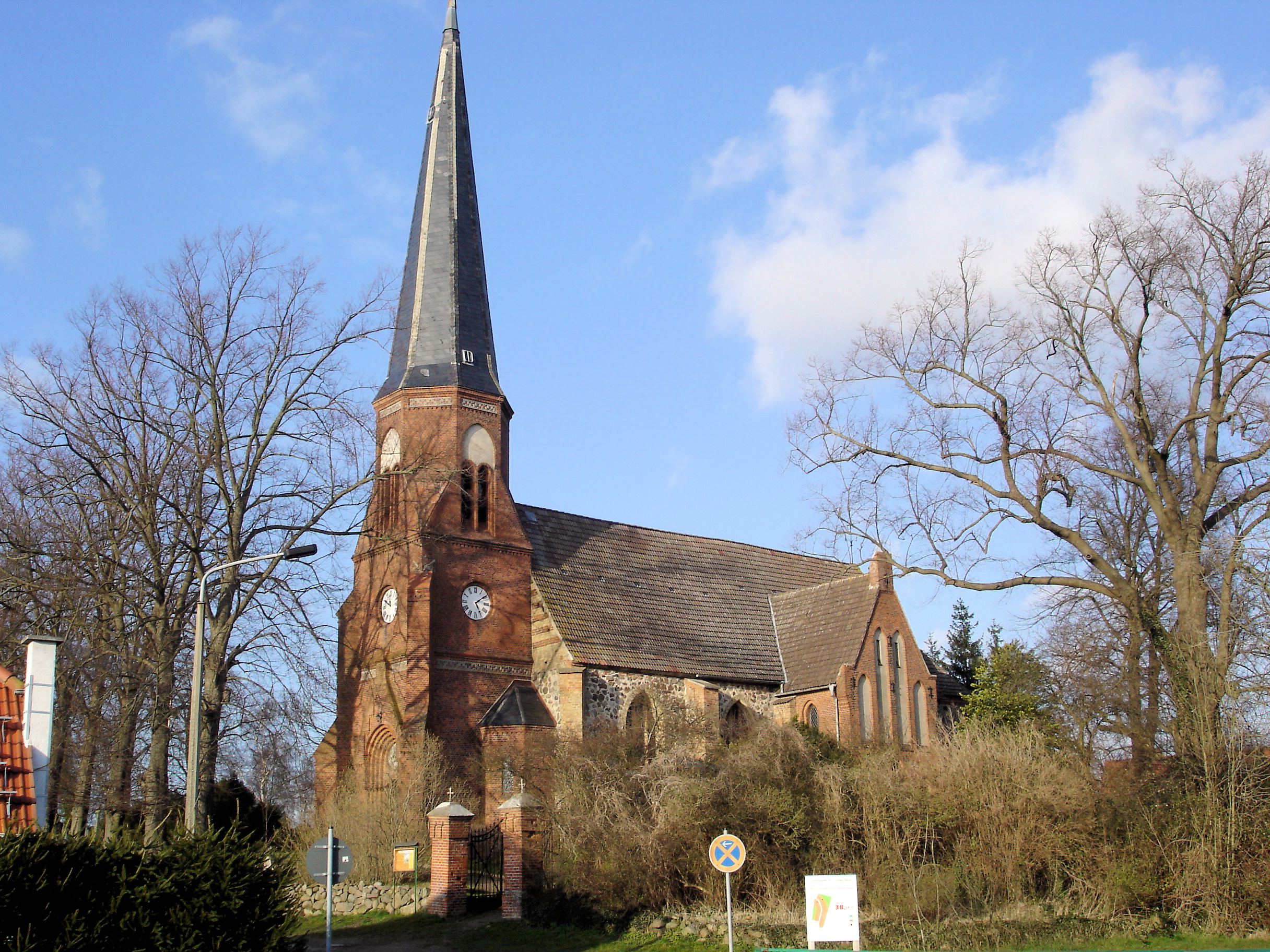 Kirche Volkenshagen / Church in Volkenshagen